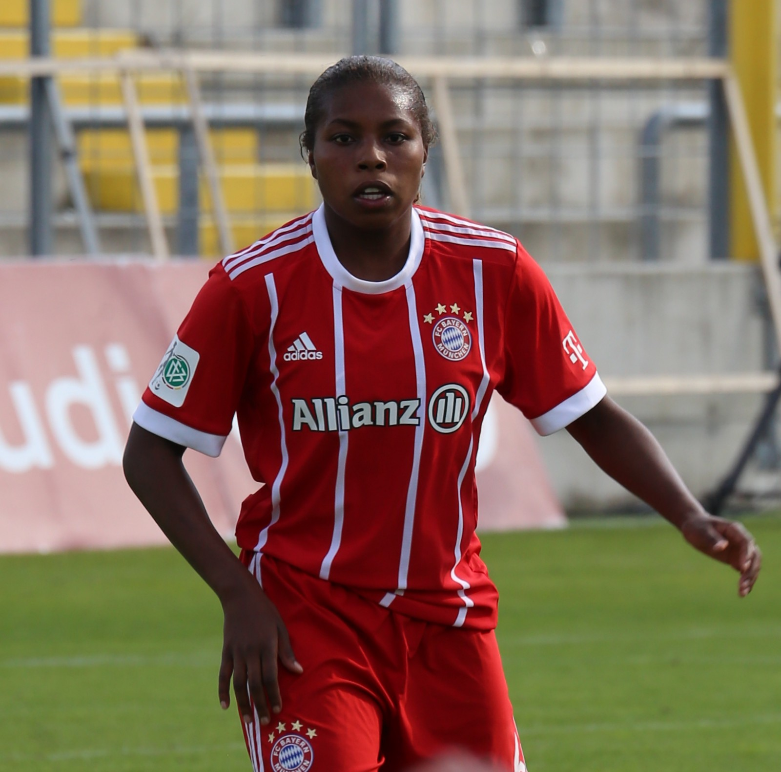 Lineth Beerensteyn beim Frauen-Bundesliga-Spiel FC Bayern München gegen 1. FC Köln am 24. September 2017 im Stadion an der Grünwalder Straße (Ergebnis war 2:0)